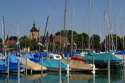 Alter Hafen von Arbon mit Blick zur Kirche St. Martin